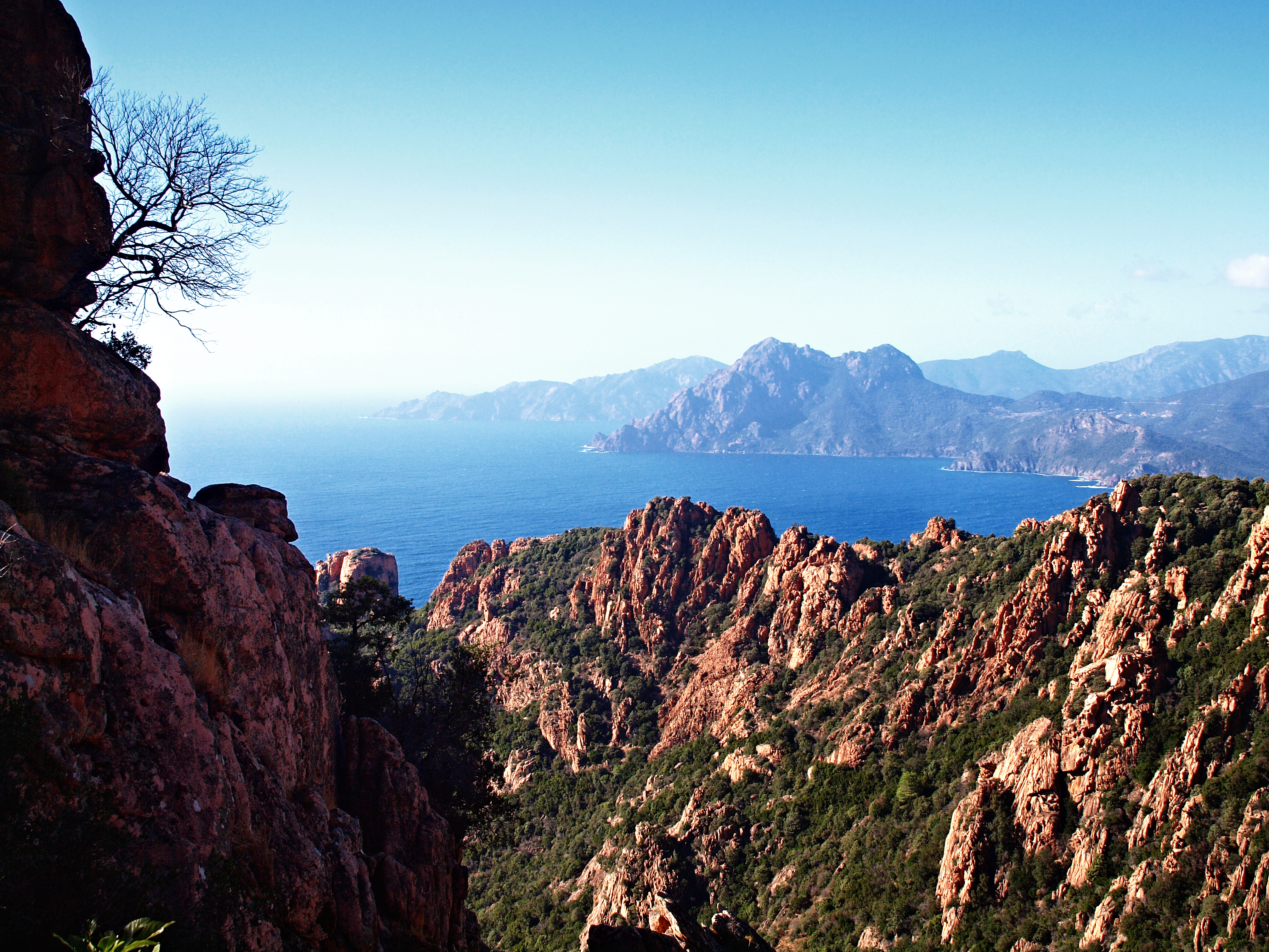 Piana (Corsica) - Vue du golfe depuis les Calanche